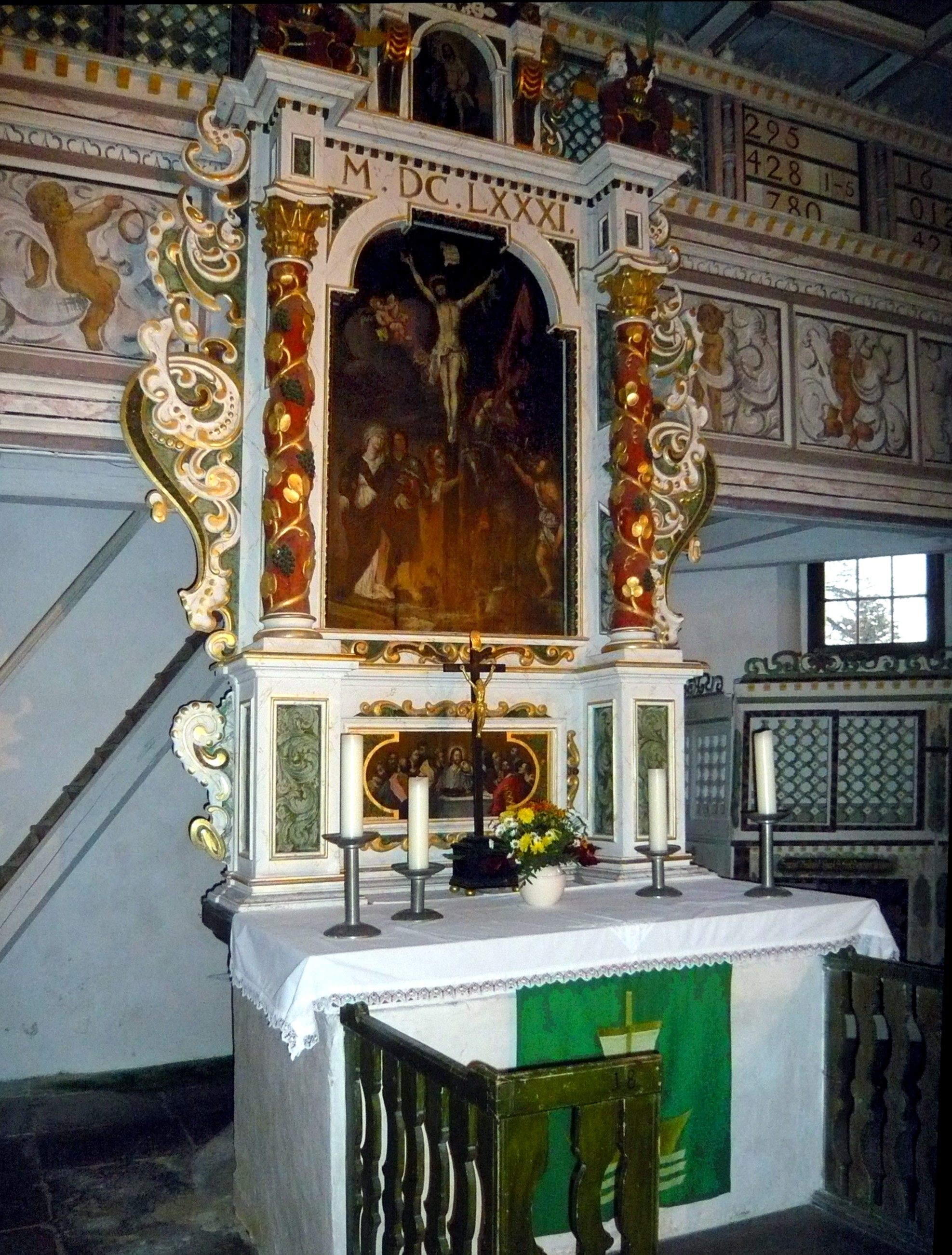 Dorfkirche Schellerhau, Altar